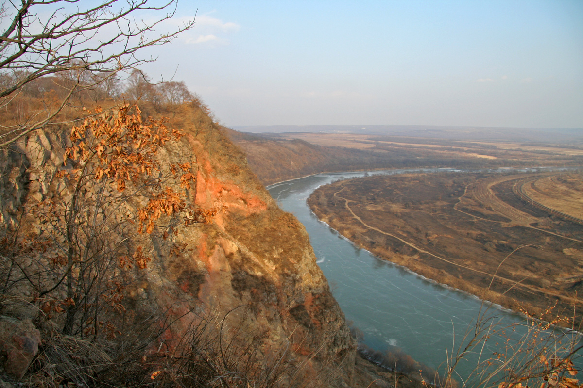 Река Раздольная. Вид с обрыва.